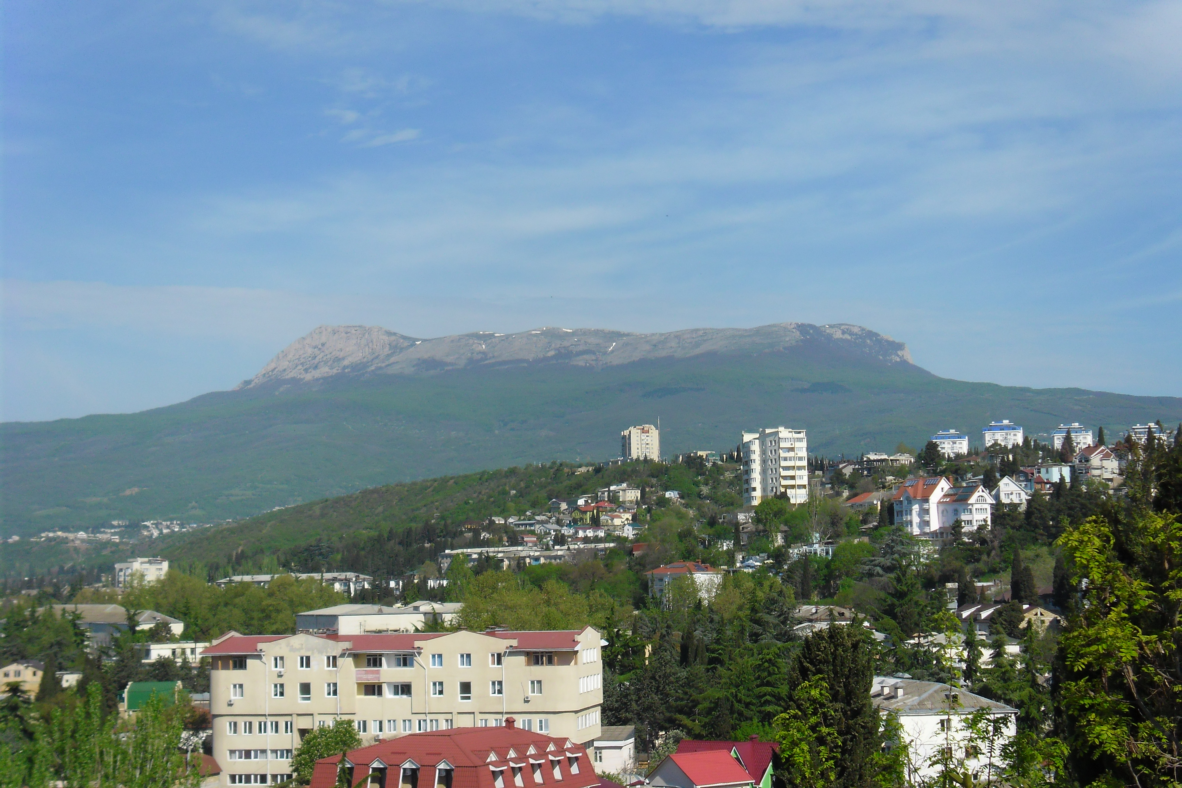 Фото